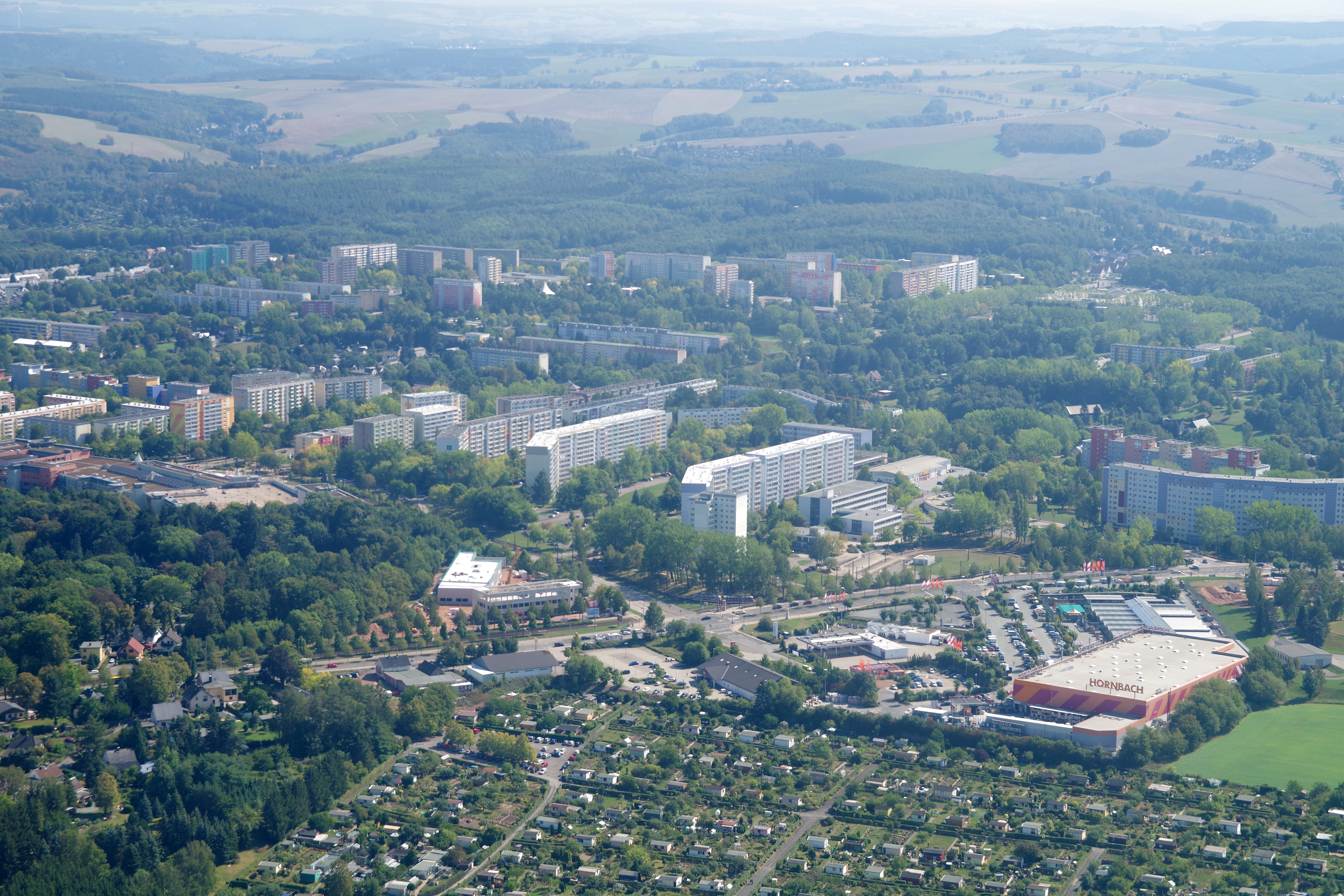 Wohngebiet Fritz Heckert - Baugebiet V, Im Hintergrund die Baugebiete VII und VIII